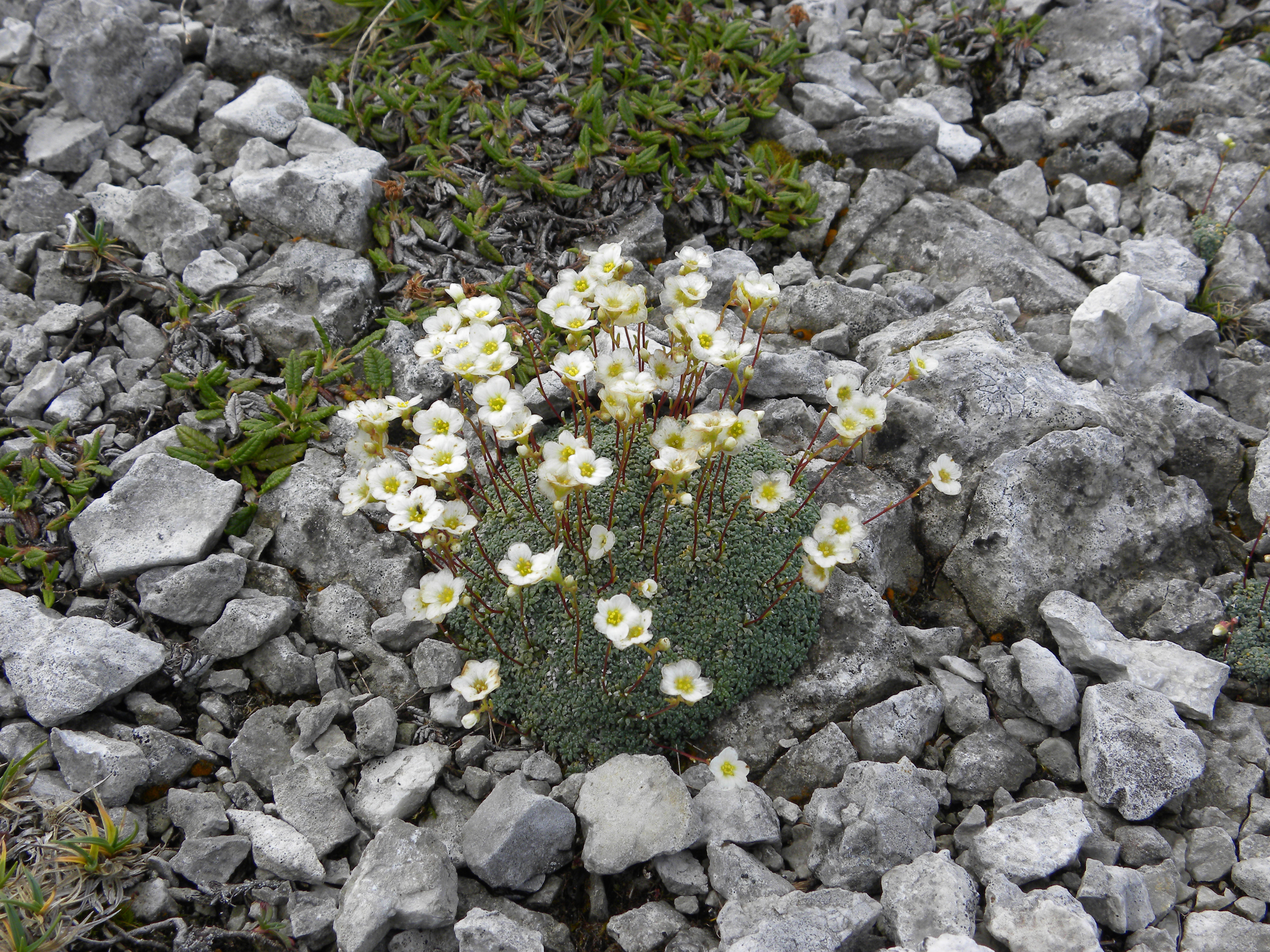 Saxifraga caesia Blaugrüner Steinbrech, gefunden auf der Hohen Veitsch